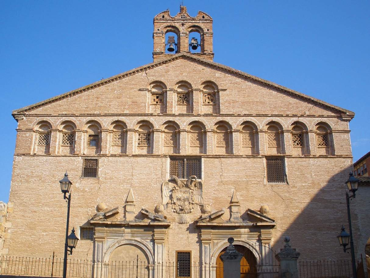 Convento de las Concepcionistas (Épila, Zaragoza)